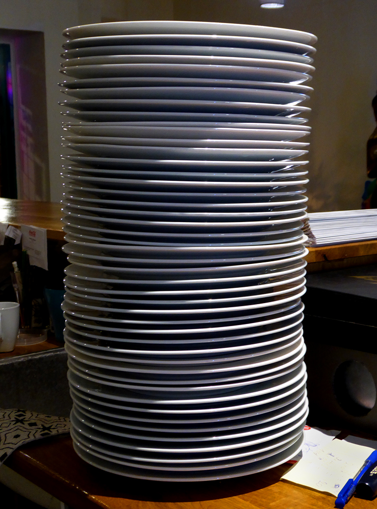 En trave med vita omönstrade tallrikar på en restaurang i Ystad 2018.